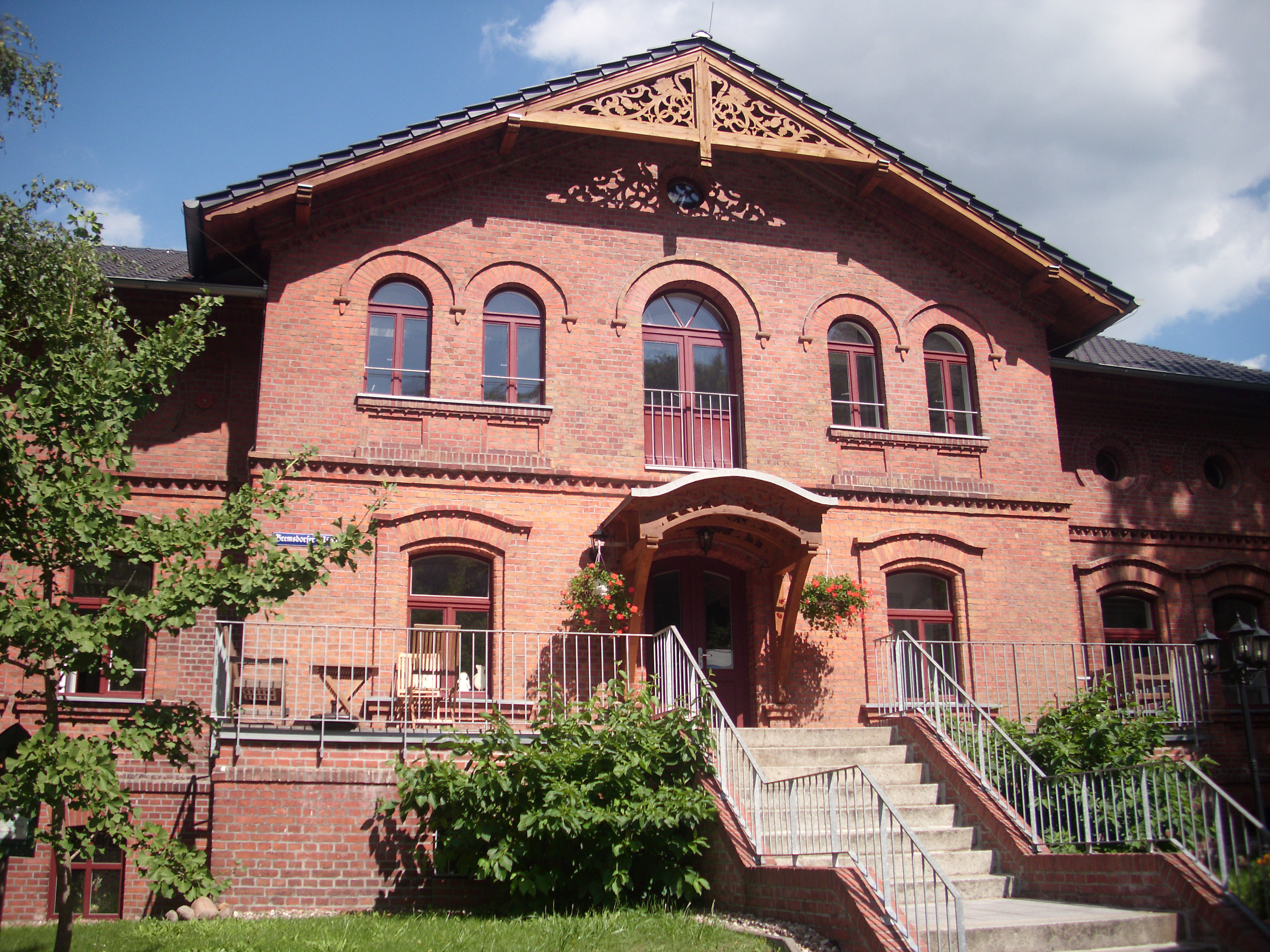 ehemalige Pensionsvilla der Bremsdorfer Mühle, Schlaubetal